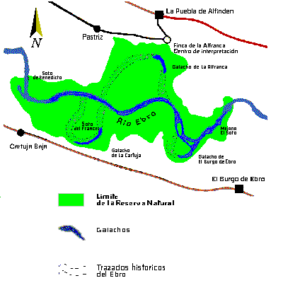 Es una foto aérea del galacho de la Alfranca.